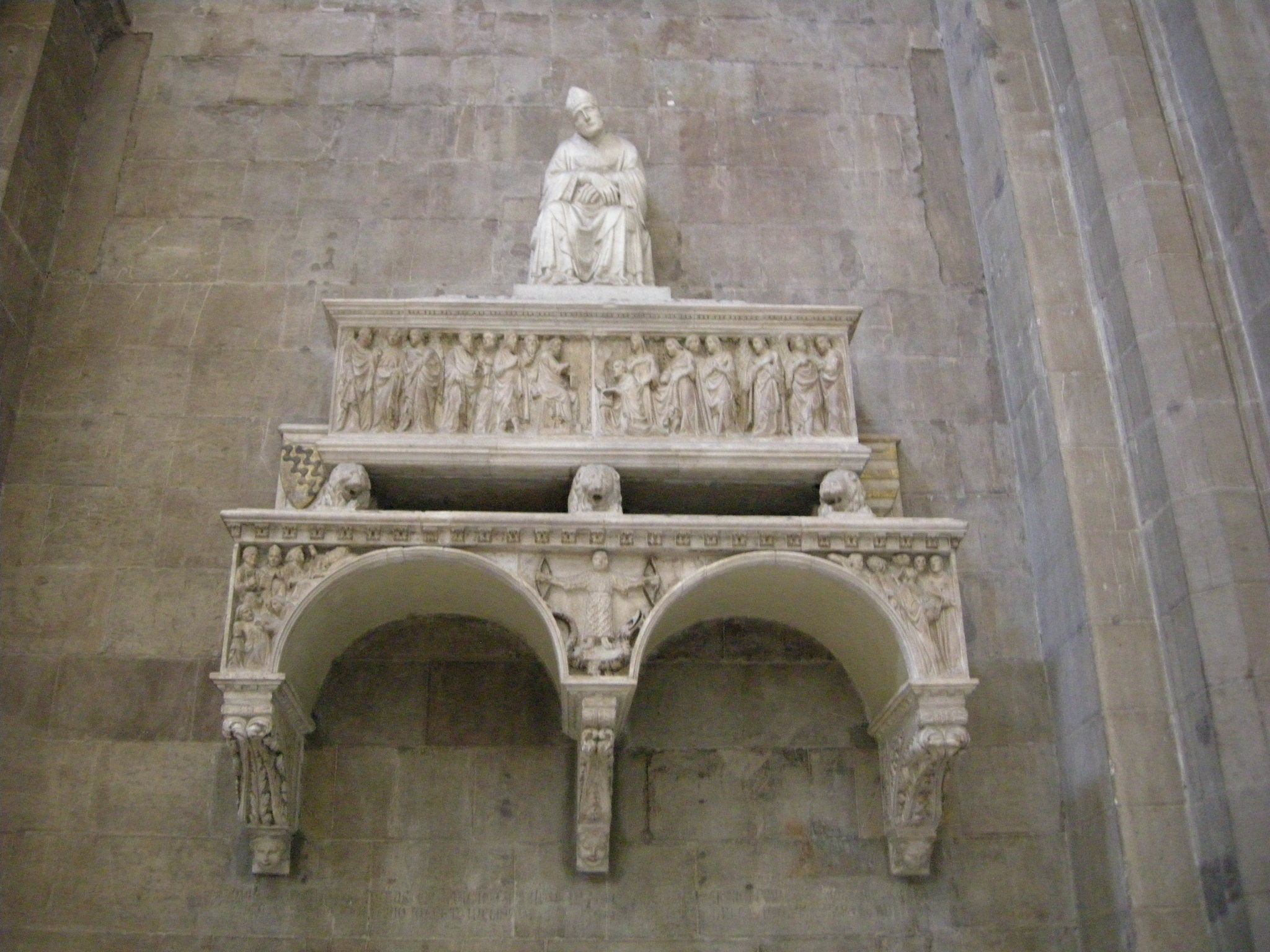 Smf, tomba antonio dell'orso by tino di camaino